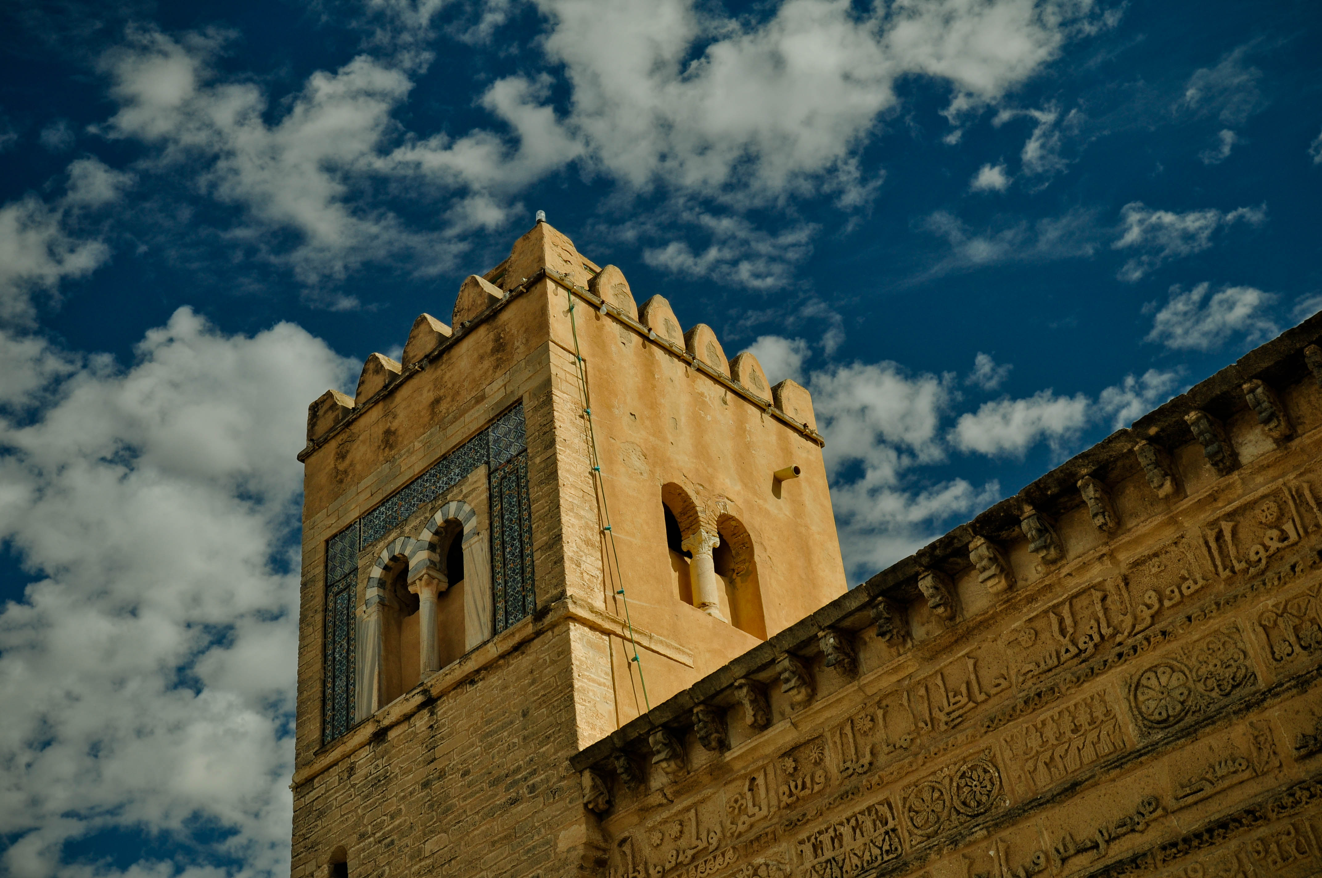 Vue du minaret de la mosquée des Trois portes également connue sous le nom de mosquée Ibn Khayrun, à Kairouan, en Tunisie.